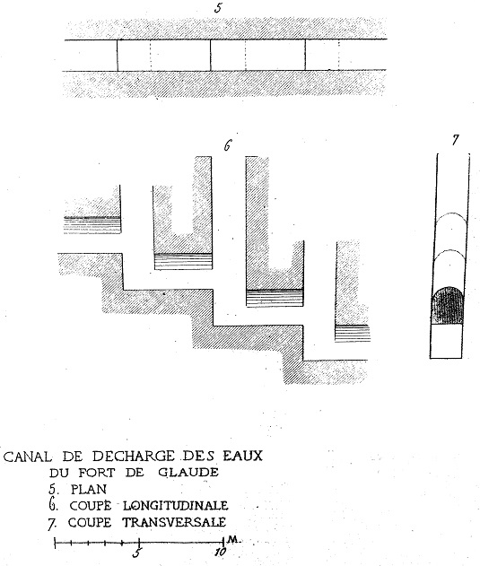 Portion des "antennes" sous-terraines de la Croix-Rousse à Lyon, dessinés par Antoine-Marie Chenavard en 1850 dans son "Lyon antique restauré"